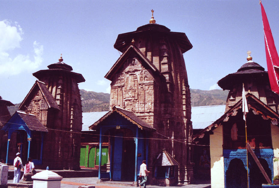 Laxminarayan temple of Chamba. Photographer: Kundan Sen.